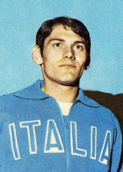 CAMPIONI dello SPORT 1970/71-n.1- ABETI - ATLETICA LEGGERA